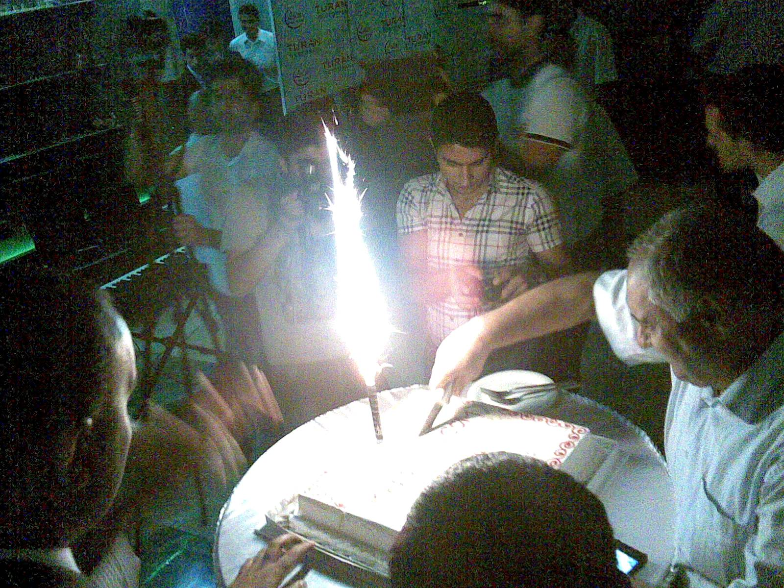 Xəbərlə - 1 yaş